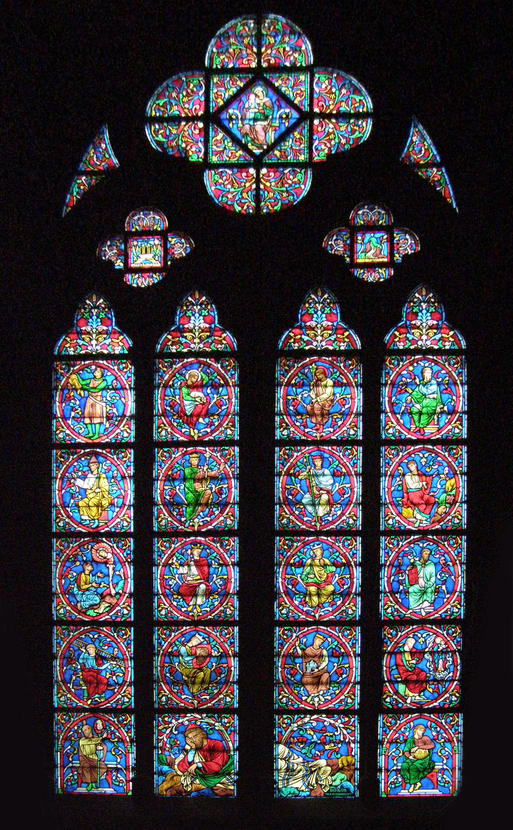 Cathédrale Notre-Dame de Paris, Jesse Tree window